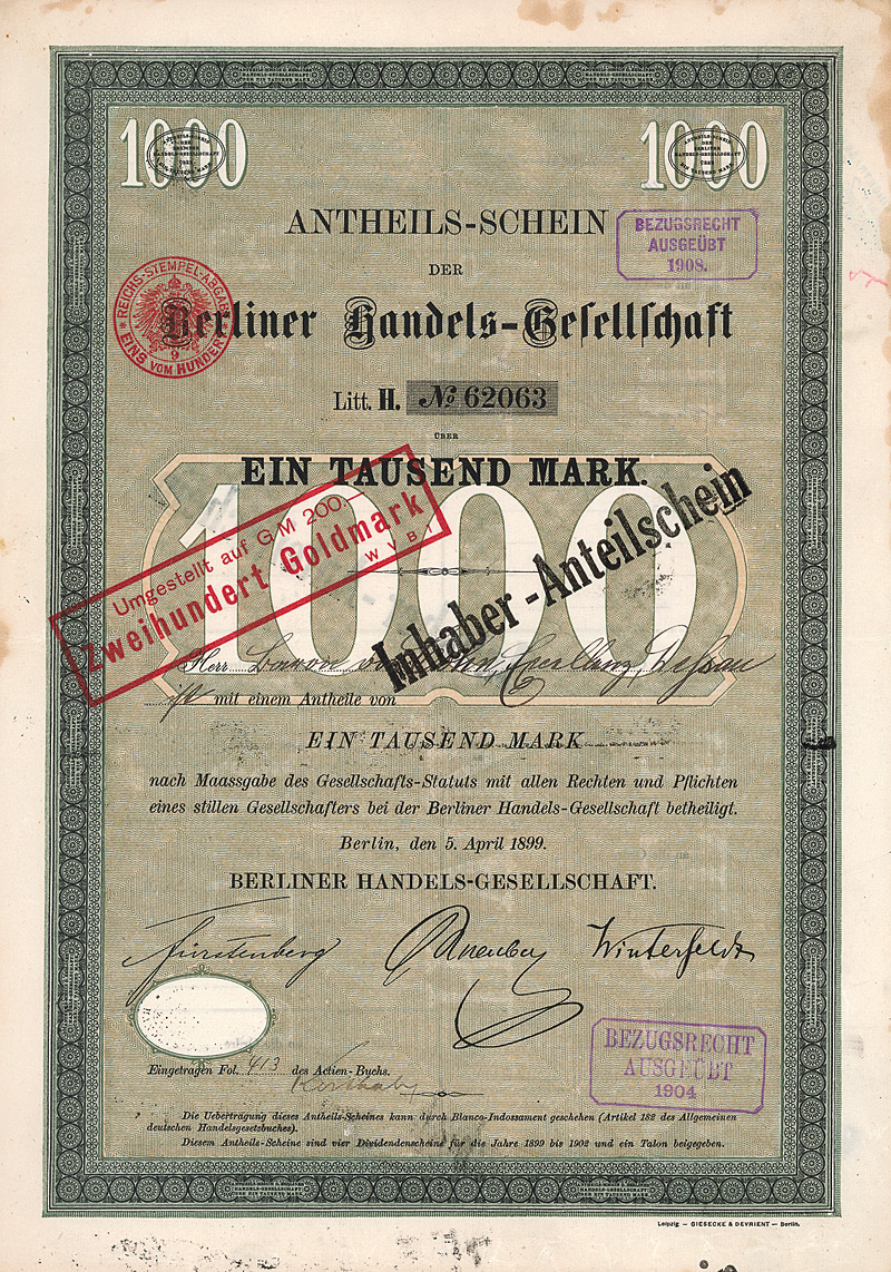 Anteilschein über 1000 Mark der Berliner Handels-Gesellschaft vom 5. April 1899